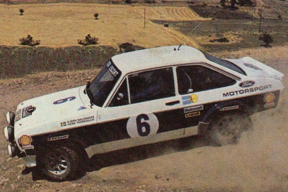 Björn Waldegård en 1977, sur Ford Escort RS 1800 MKII au rallye de l'Acropole, 'Super Auto Panini 77', figurina n°41.